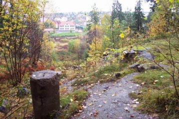 Hoppbakke i Rognerudskogen i Oslo